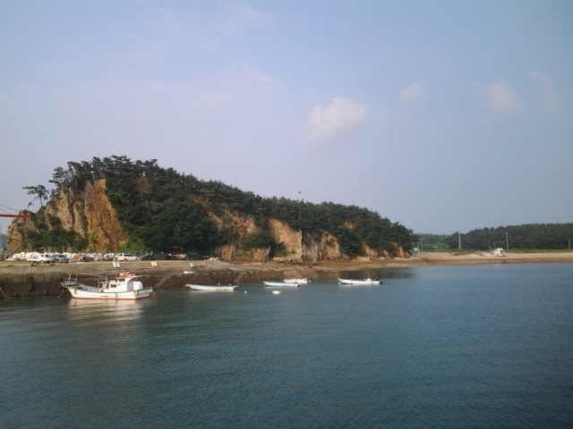 삽시도의 모습